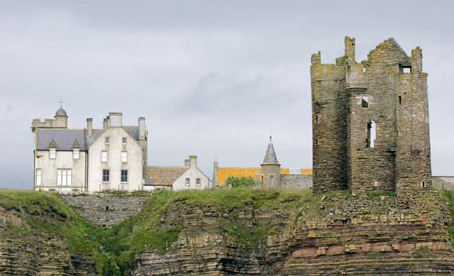 Keiss Castles